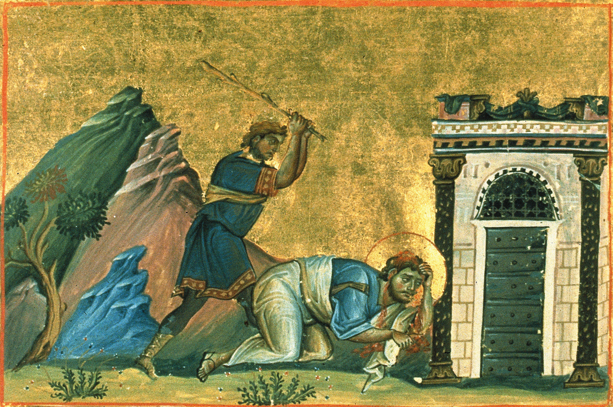 Апостол Иаков Алфеев. Миниатюра из Минология Василия II. 976-1025 гг. (Vat. gr. 1613. P. 337)